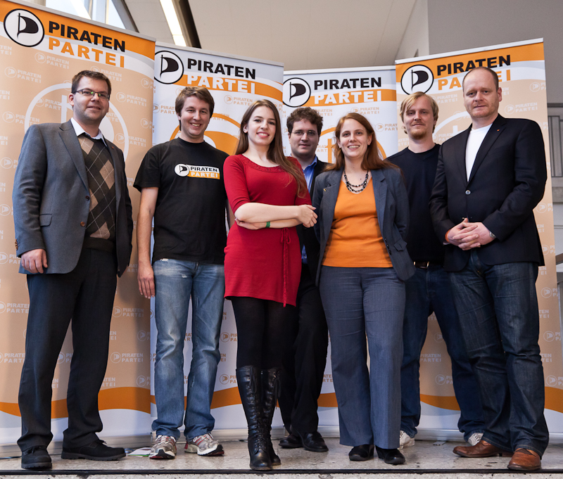 Vorstand der Piratenpartei Deutschland auf dem Piratenparteitag 2011.2 v.l.n.r.: René Brosig, Matthias Schrade, Marina Weisband, Sebastian Nerz, Gefion Thürmer, Wilm Schumacher, Bernd Schlömer